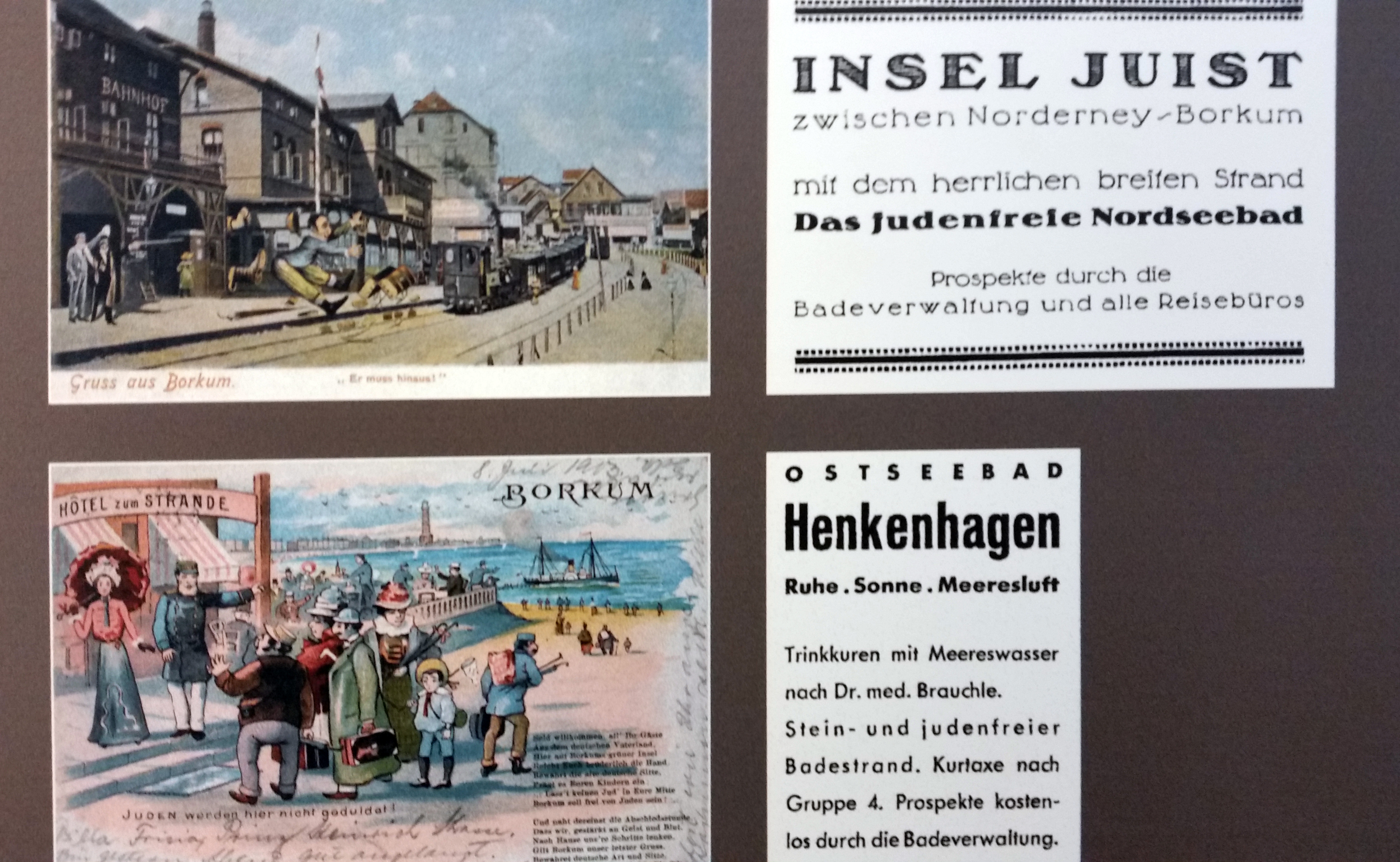 Antisemitische Grußpostkarten und Anzeigenwerbung von Seebädern mit ,,Judenfrei" Anfangs des 20. Jahrhunderts. Gefunden in der Ausstellung zur Badekultur im Museum Römerbad, Zülpich.